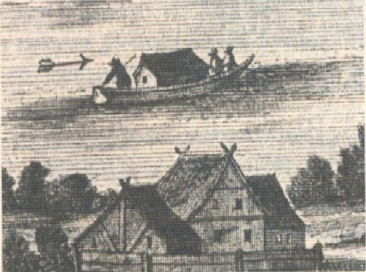 Bernhard Werner rézkarca Révkomáromról